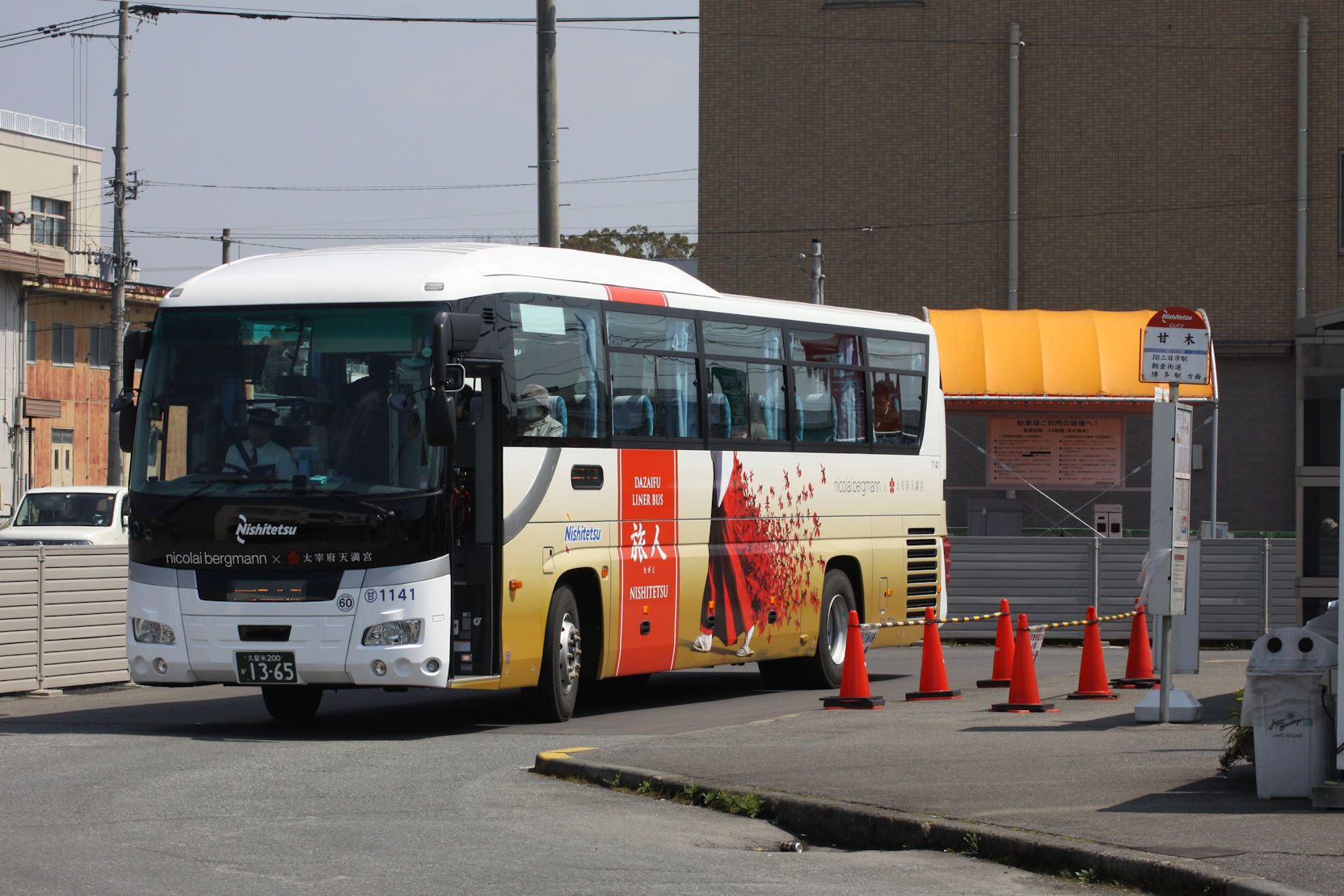 西鉄バス1141（いすゞ・ガーラ 甘木第2営業所配置）